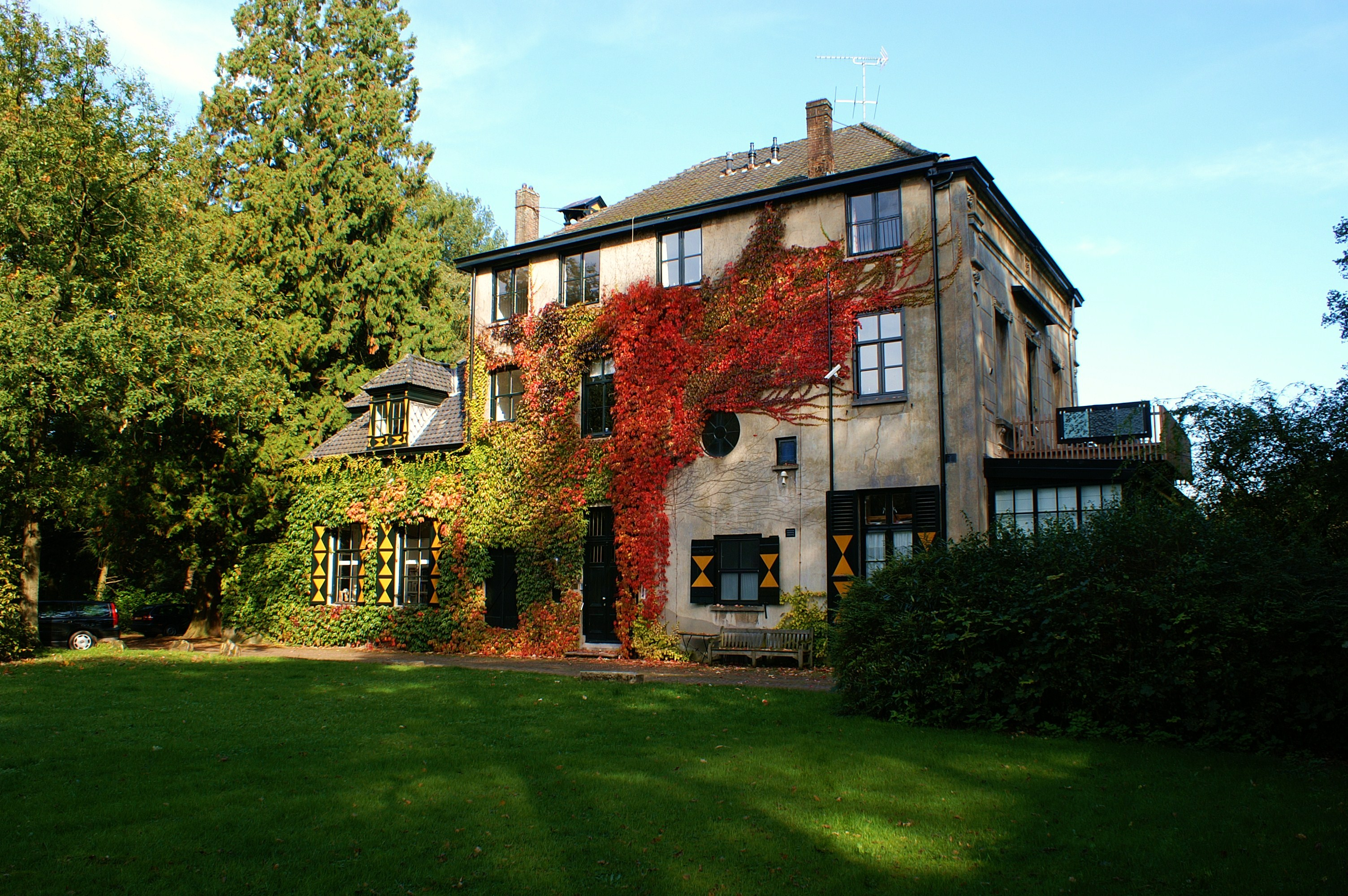 Huize Eikenhorst te Esch.